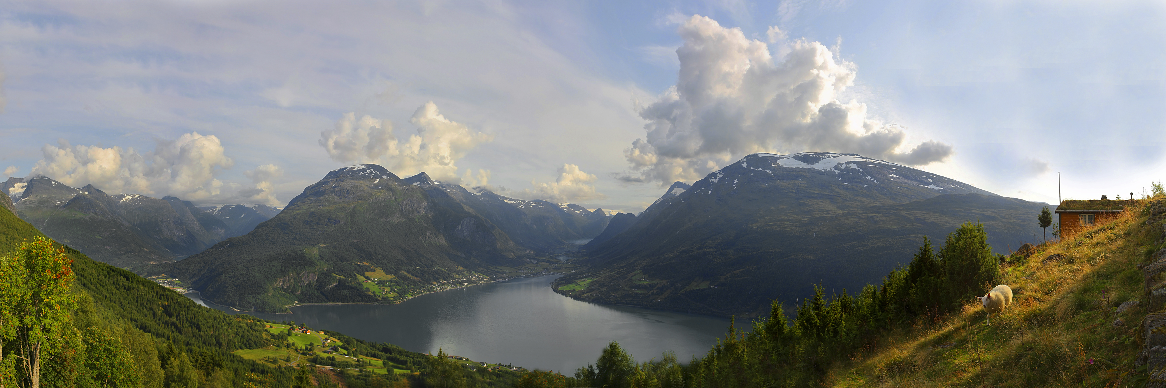 inste delen av fjorden Nordfjord. Loen til venstre, Olden i midten.